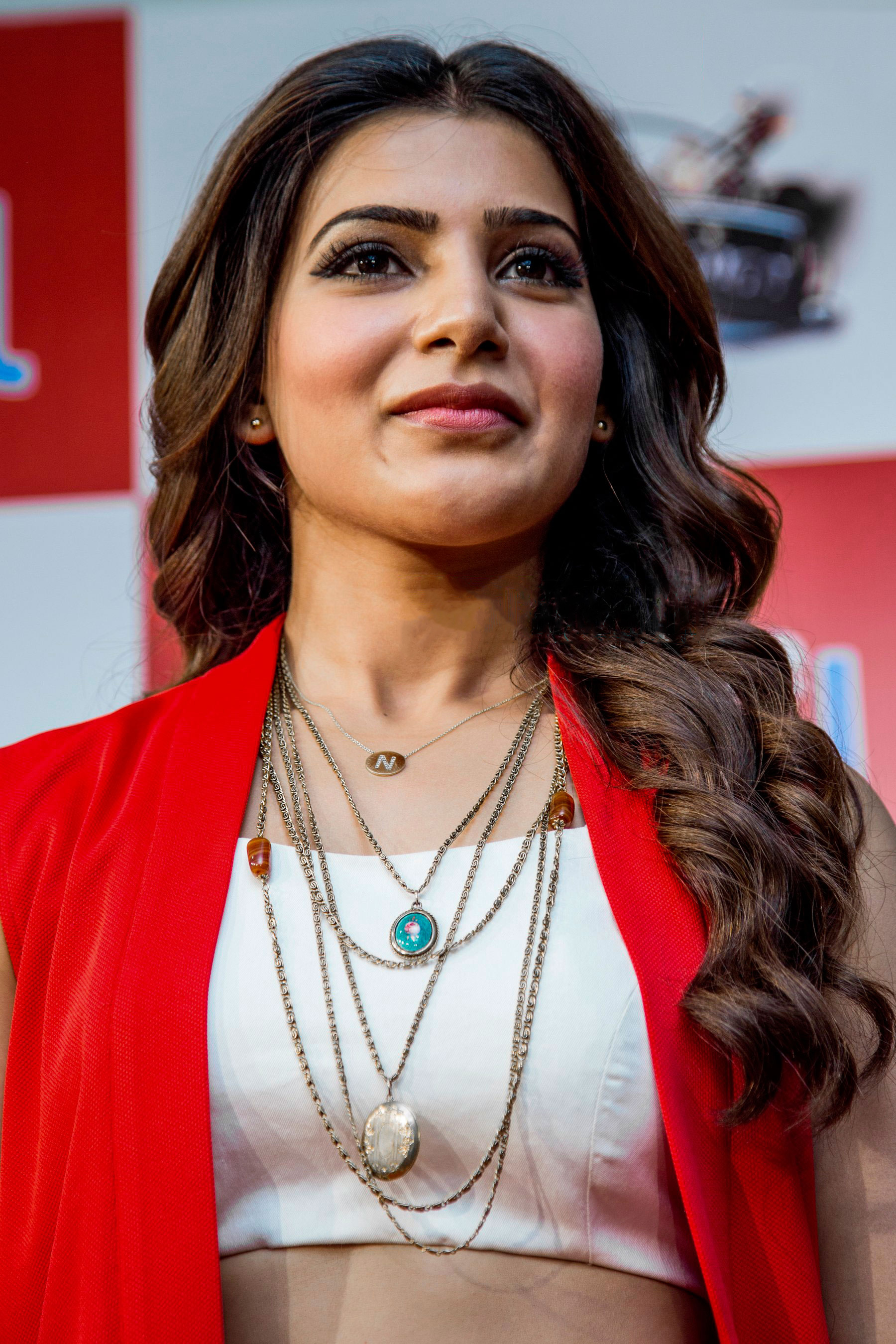 Samantha at 10 Enradhukulla Teaser Launch